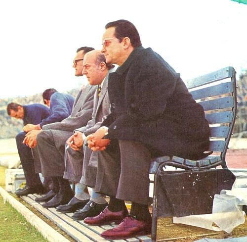 Fabbri, Edmondo